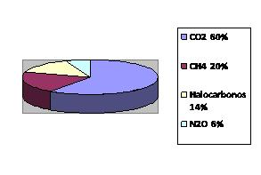 Influencia relativa de los gases invernadero creados por el hombre en el cambio de la temperatura (Fuente: Lomborg, 2001: 365. Tomado de IPCC, 2001a: tabla 6.1)